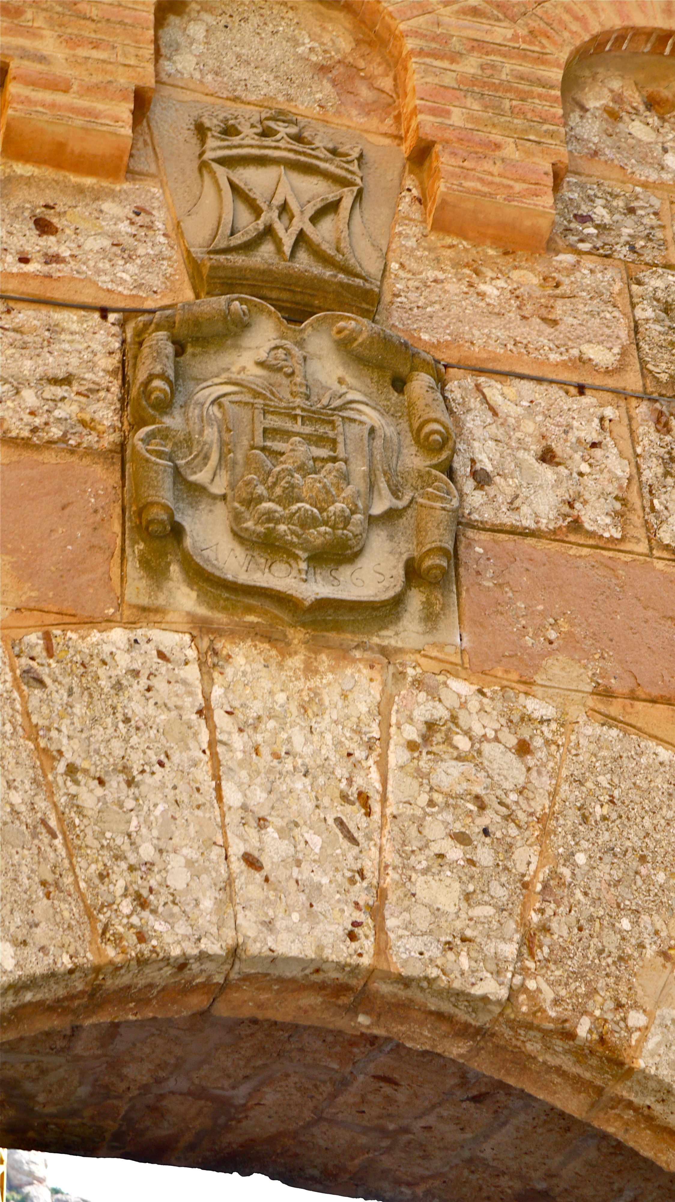 P1110011 Montserrat, Plaça de l'Abat Oliba, détail d'armoiries au-dessus de la porte conduisant à la basilique; rare vestige de l'époque médiévale